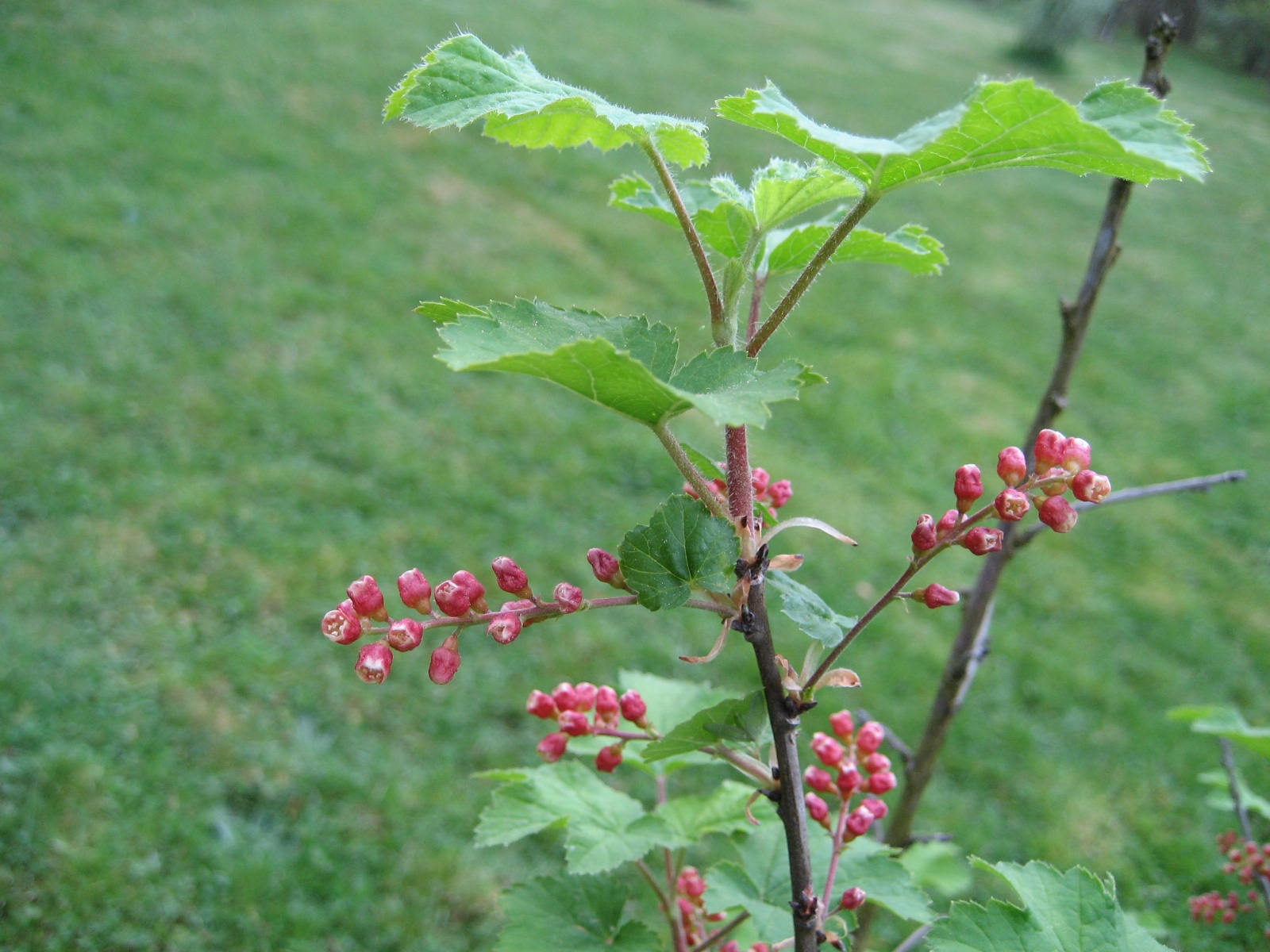 Ribes meyeri - Blüte - Bot. Garten Berlin Dahlem